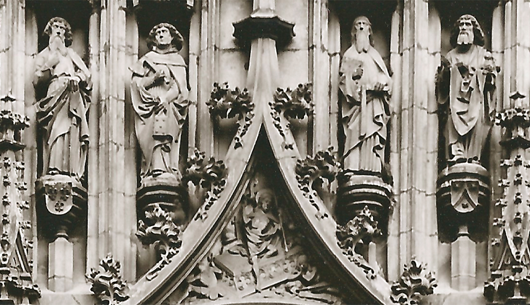 Lilien- und Sparrenwappen des Ehepaars Adelheid von Magstatt und Aberlin Jörg am Aposteltor der Stuttgarter Stiftskirche